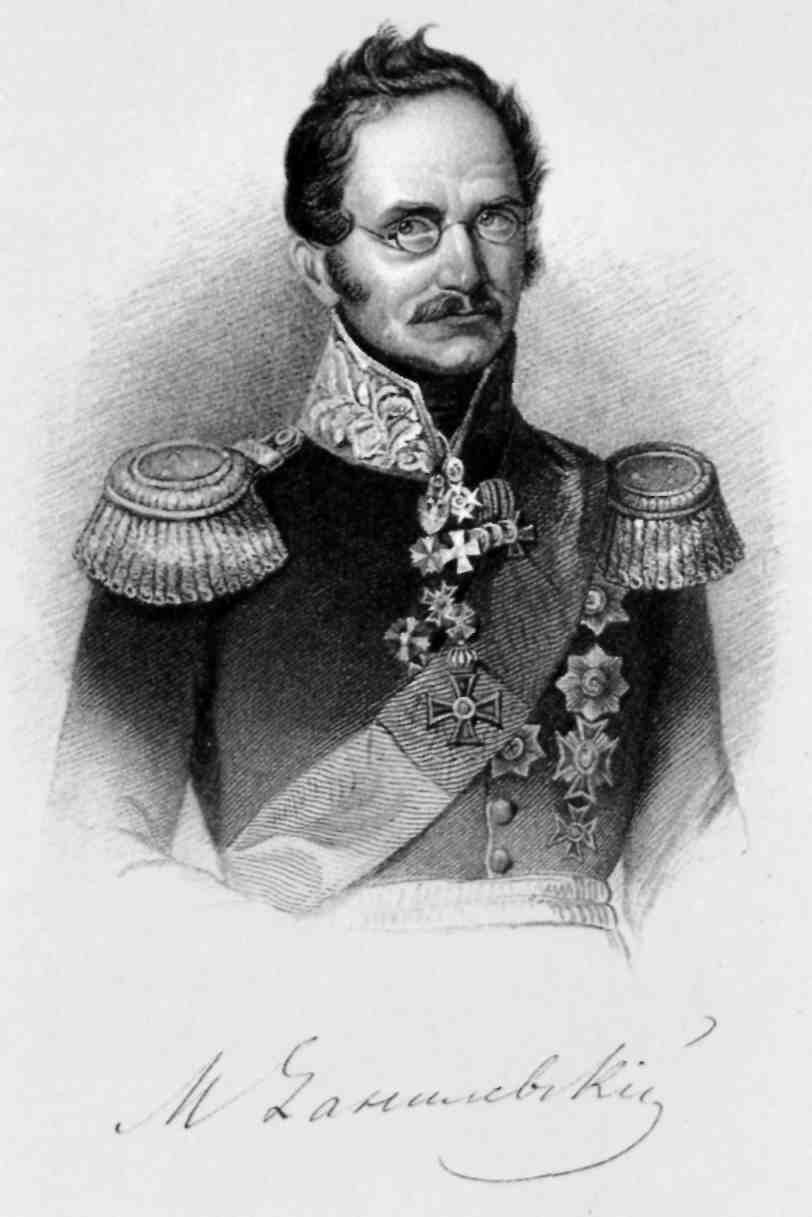 Портрет генерала-лейтенанта Михайловского-Данилевского Ал. Ив.